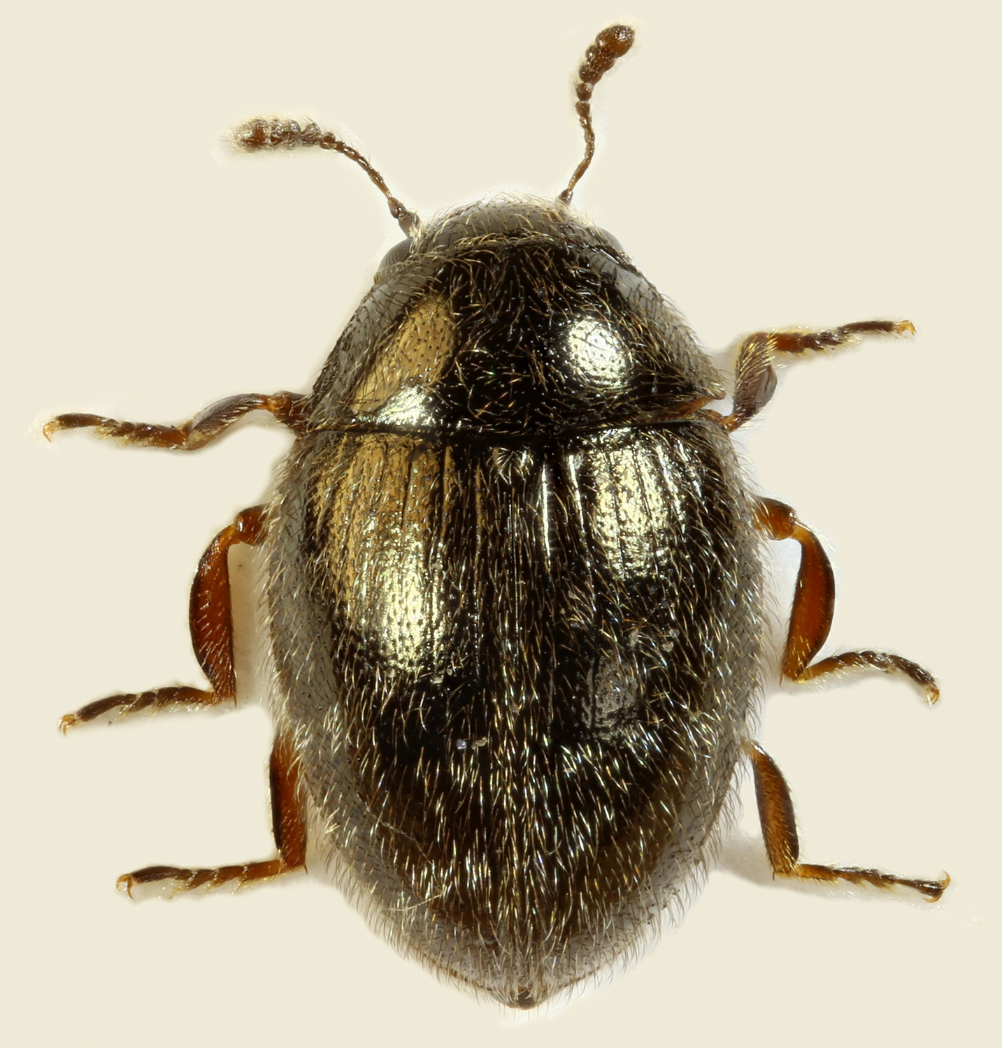 image description